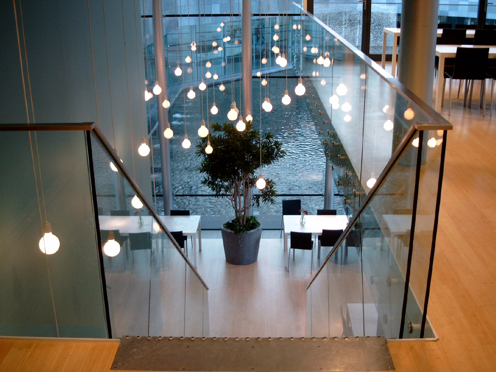 Cafetaria Van Abbemuseum, Eindhoven, ontwerp Maarten Van Severen